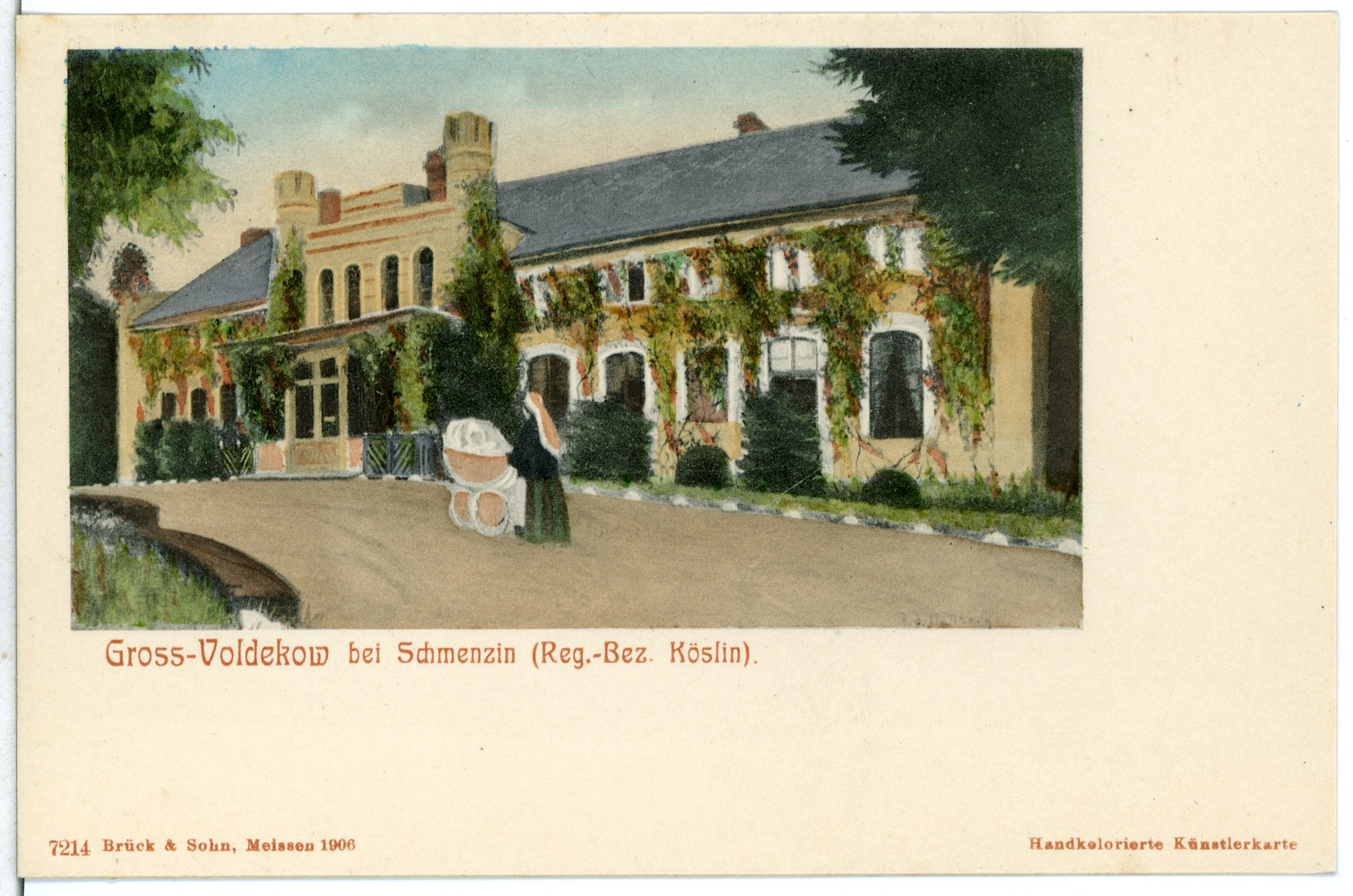 Groß Voldekow; Ortsansicht (bei Schmenzin) This postcard is from publisher Brück & Sohn in Meißen ( postcard has a unique number 07214 and is available in a higher resolution at the publisher. This images was uploaded in a cooperation project between Wikipedians and the publisher.